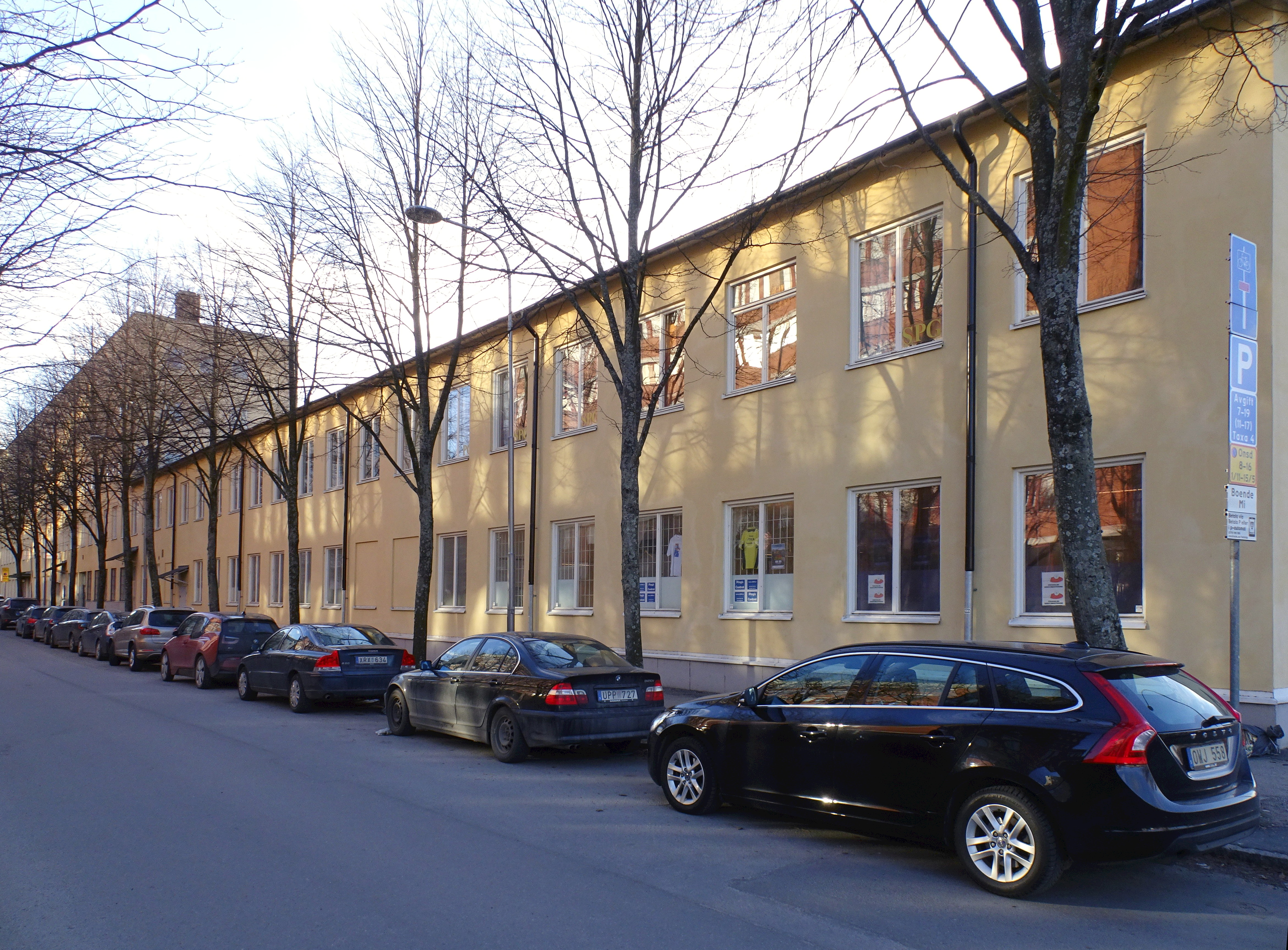 Fastigheten Tryckeriet 13, Strängbetongs gamla fabrik på .Liljeholmen, arkitekt Axel Eriksson (1942) om- och påbyggnad (1961) arkitekt Gustaf Lettsröm.